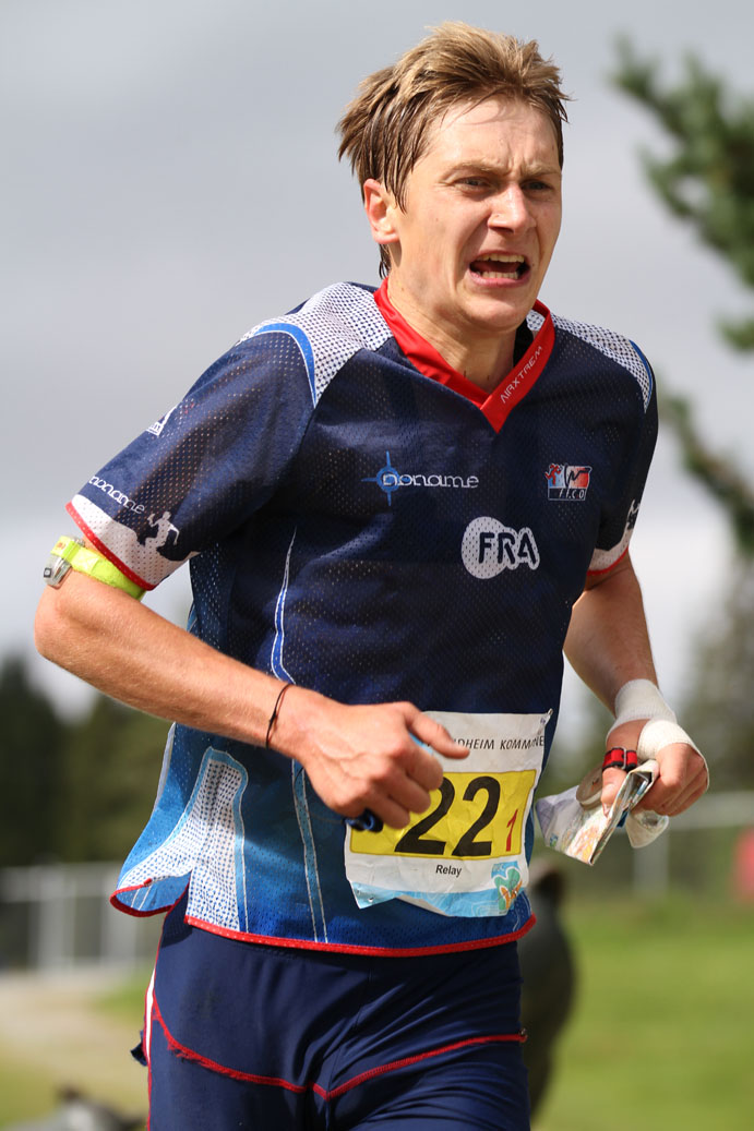 Philippe Adamski during Relay at WOC 2010